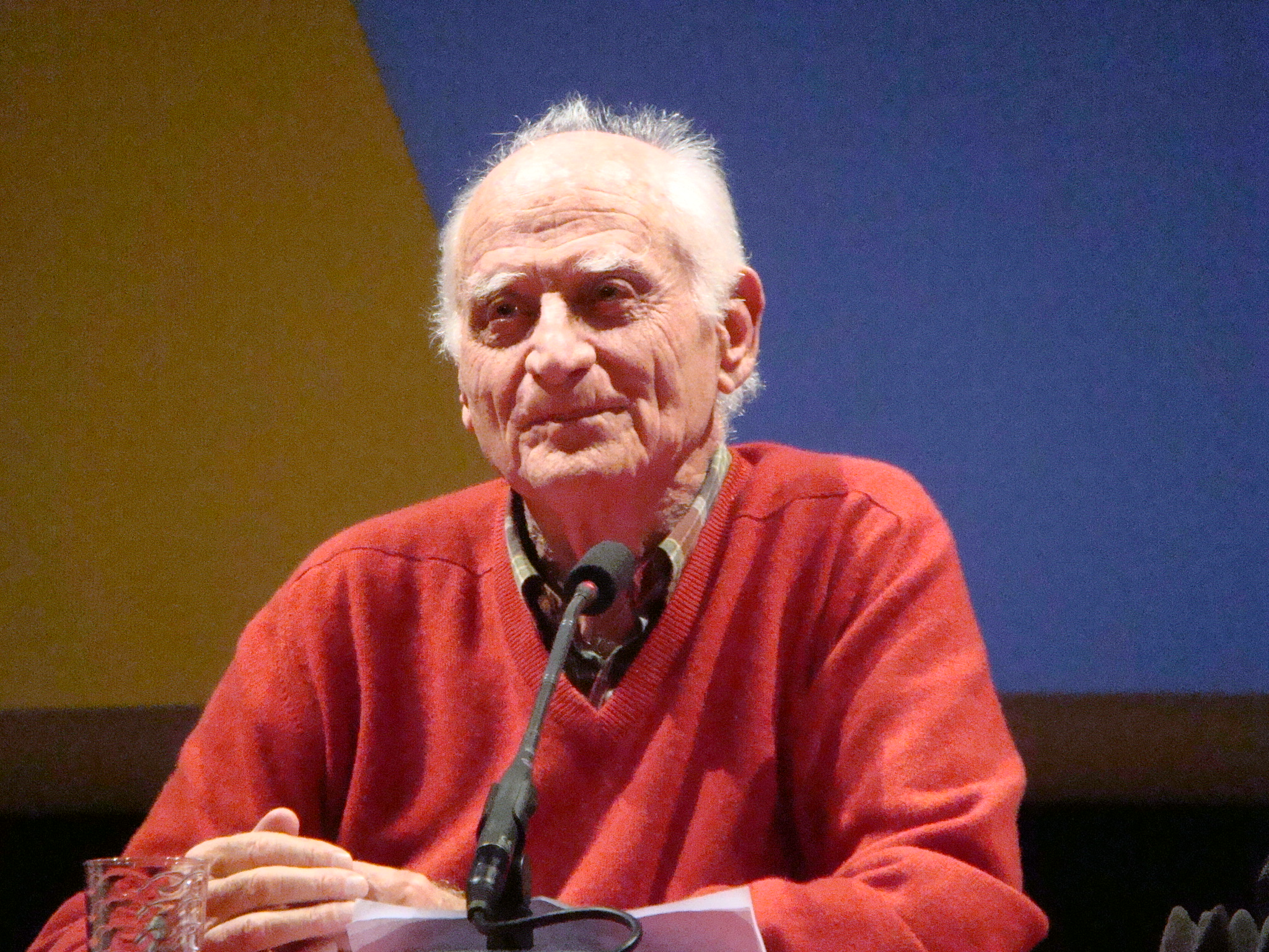 Michel Serres à l'Espace des sciences, 15 février 2011